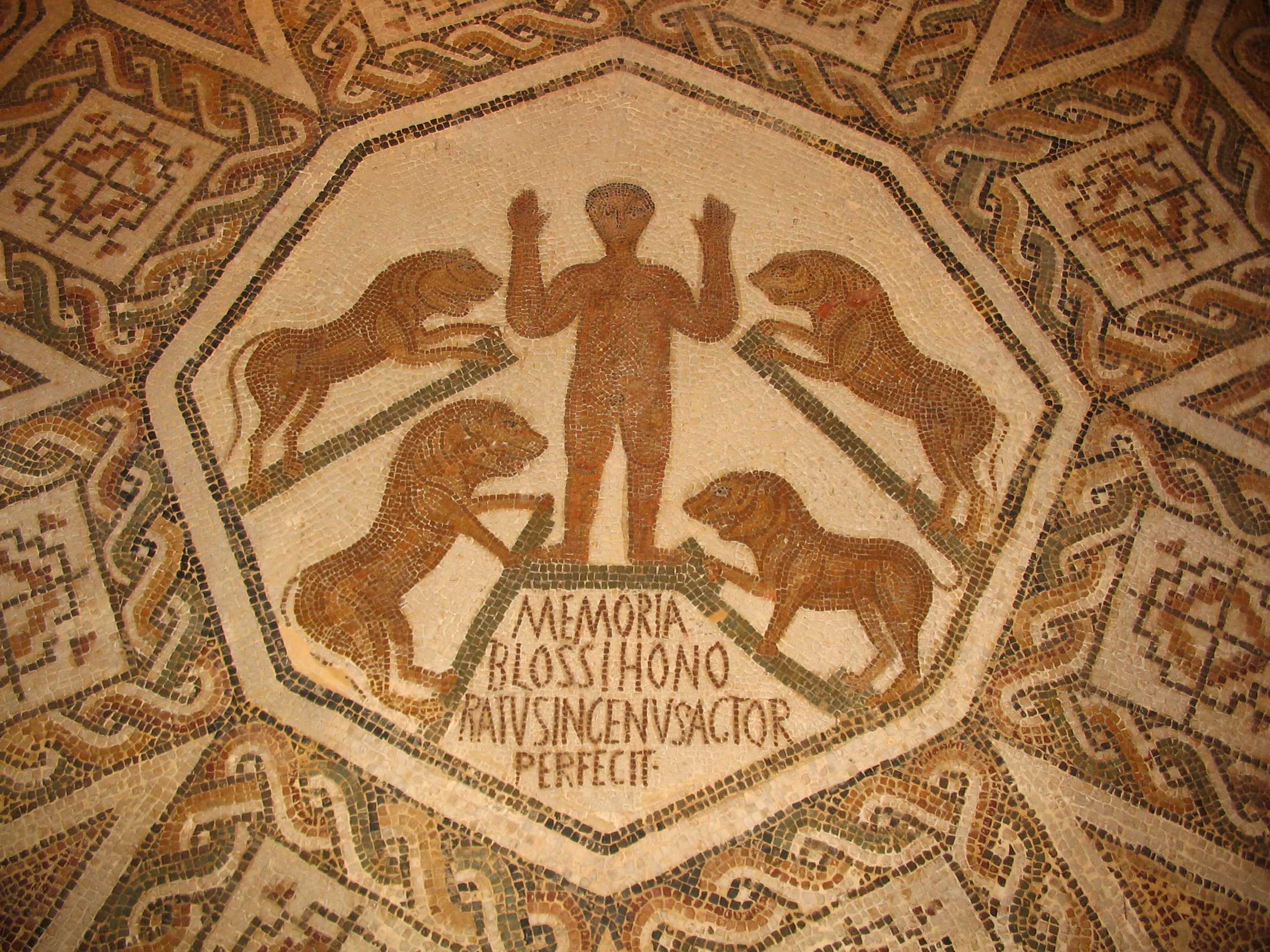 Mosaico romano detto di "Daniele tra i leoni", cristiano, al Museo del Bardo a Tunisi. IV secolo d.C.